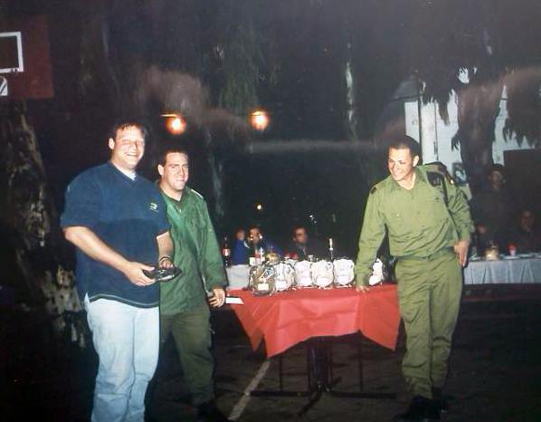 נדב לישצינקר לוטן ועמיחי יודנפרויד בטקס פרידה מפלוגה ו' גדוד 77